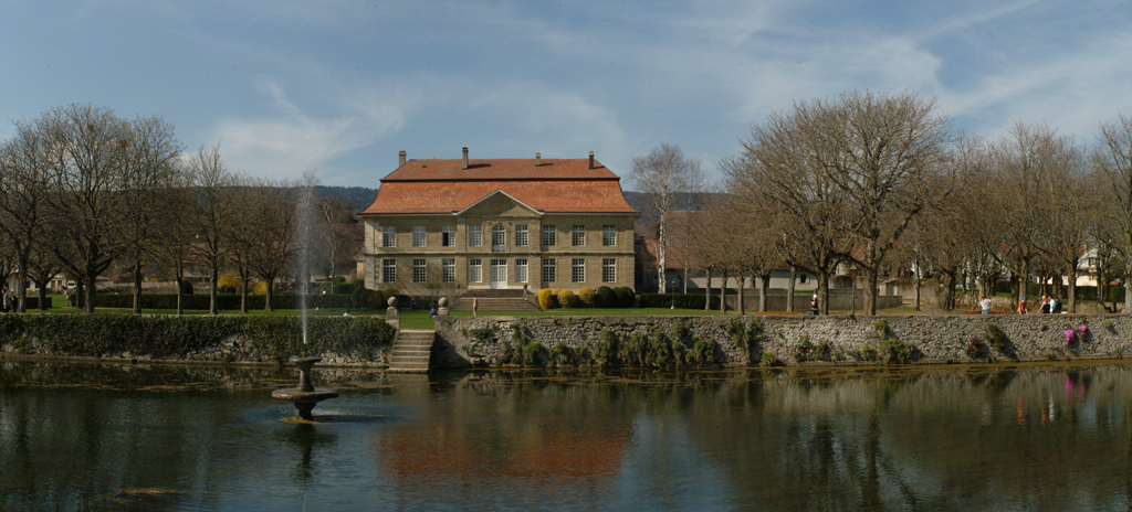 Versailles en miniature: un château aux proportions harmonieuses, premier exemple régional de classicisme à la française, construit en 1696 par Charles de Chandieu, officier de l’armée française. Le château n’est pas ouvert au public et ne peut donc être admiré que de l’extérieur.